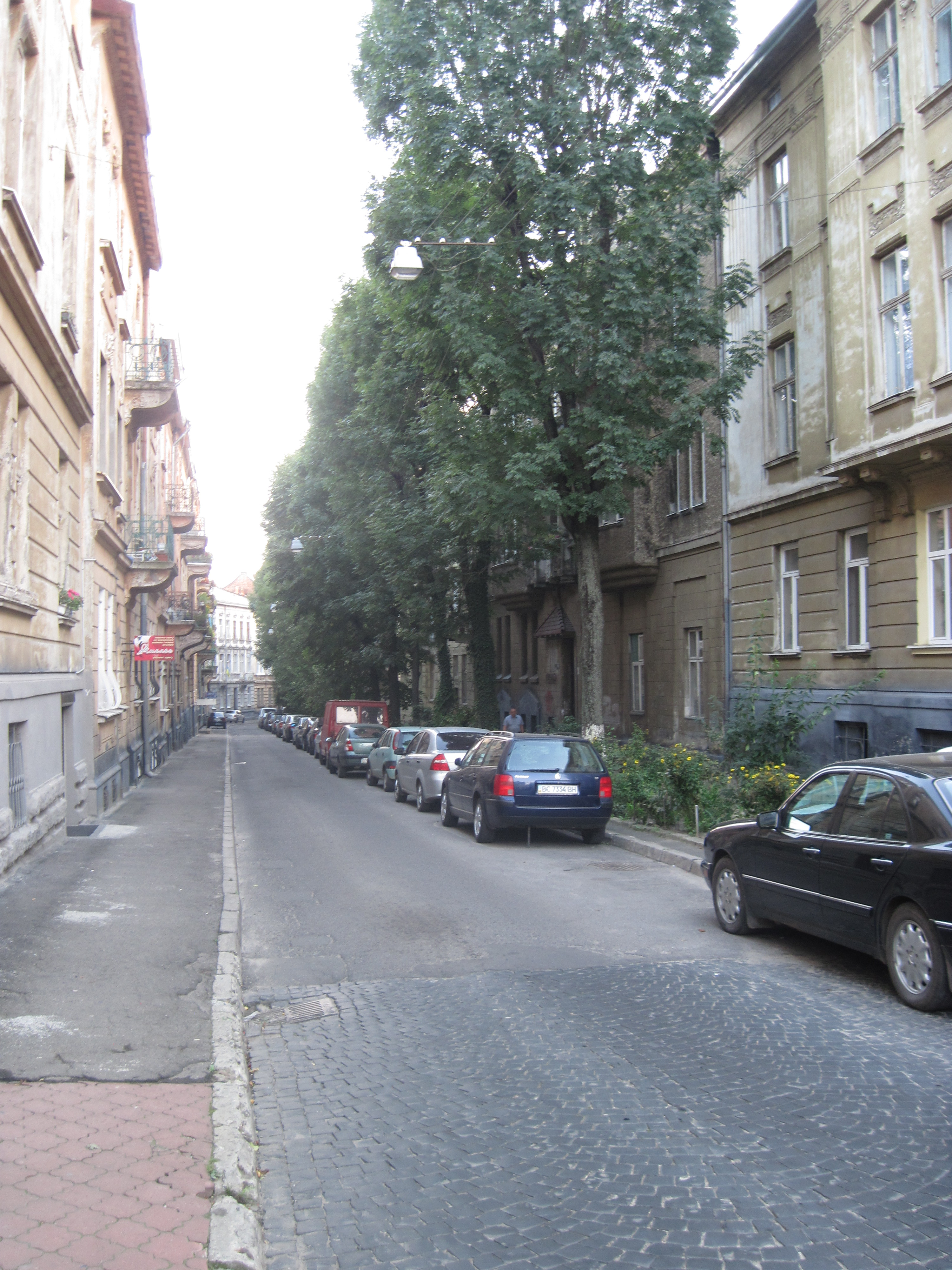 Вул. Донцова, Львів, осінь 2014